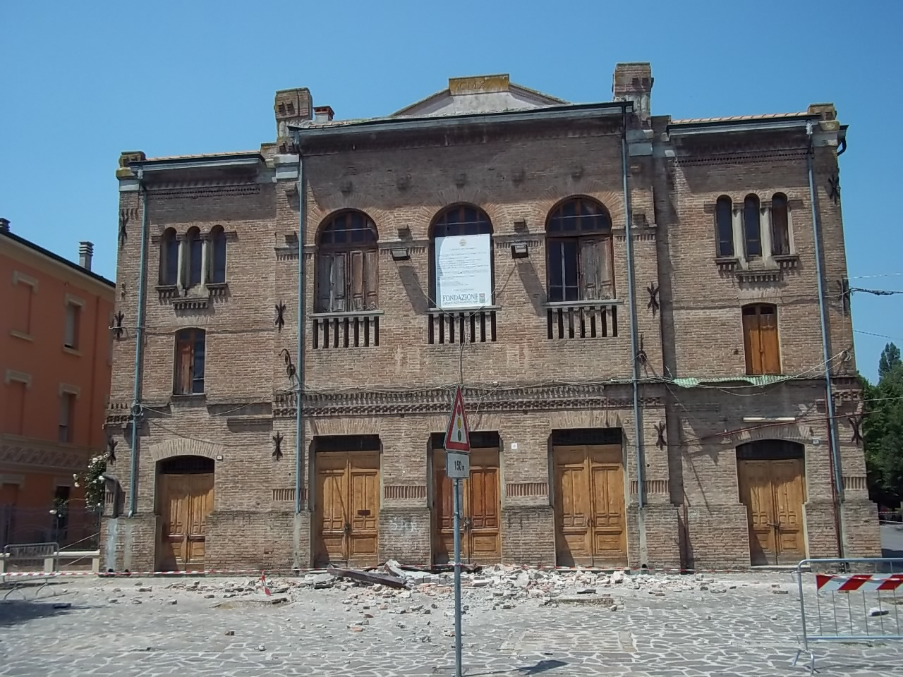 Teatro Sociale This is a photo of a monument which is part of cultural heritage of Italy.